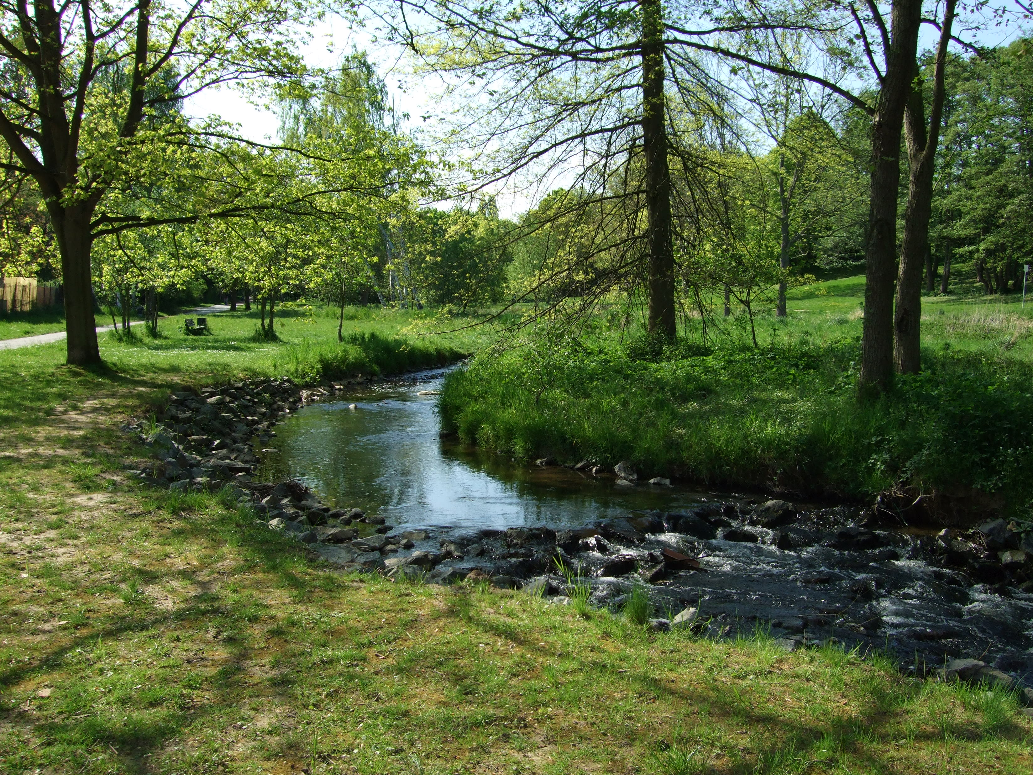 Sulzbach in Sossenheim (naturnah)